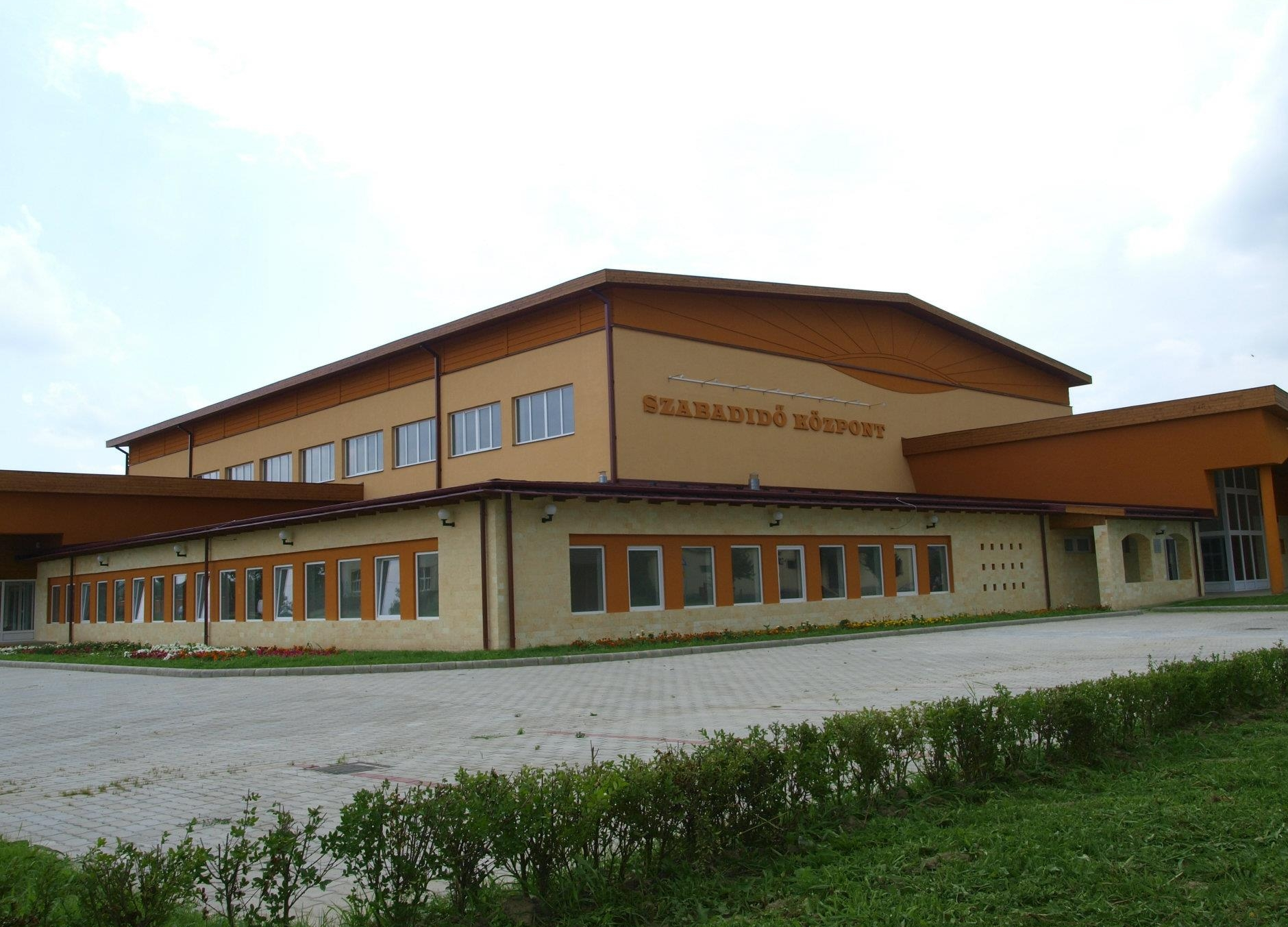 A Szabadidő Központ (Sportcsarnok) Cigándon. Az épületet 2008-ban adták át.